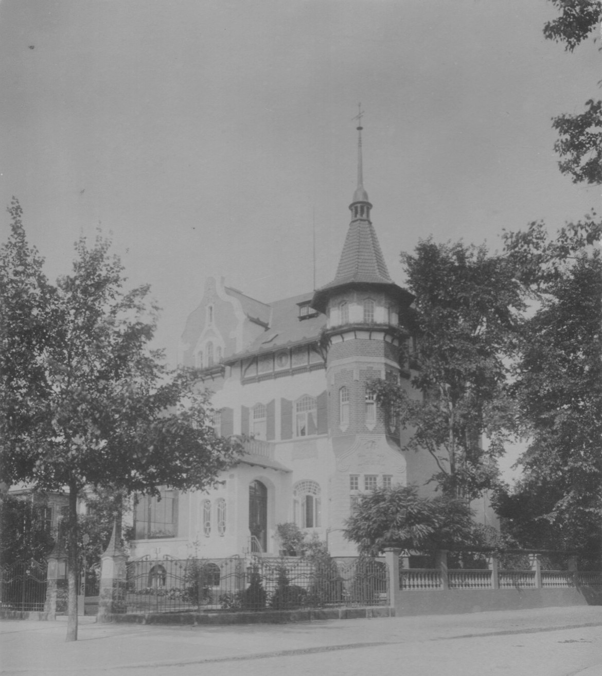 Bremen, Schwachhausen, Schwachhauser Heerstraße 90 // Donandtstraße Jugendstil, Bauunternehmer Carl Vollmer